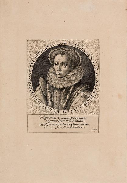 Магдалена (1553-1633), герцогиня Юлих-Клеве-Бергская, герцогиня и пфальцграфиня Цвейбрюккена